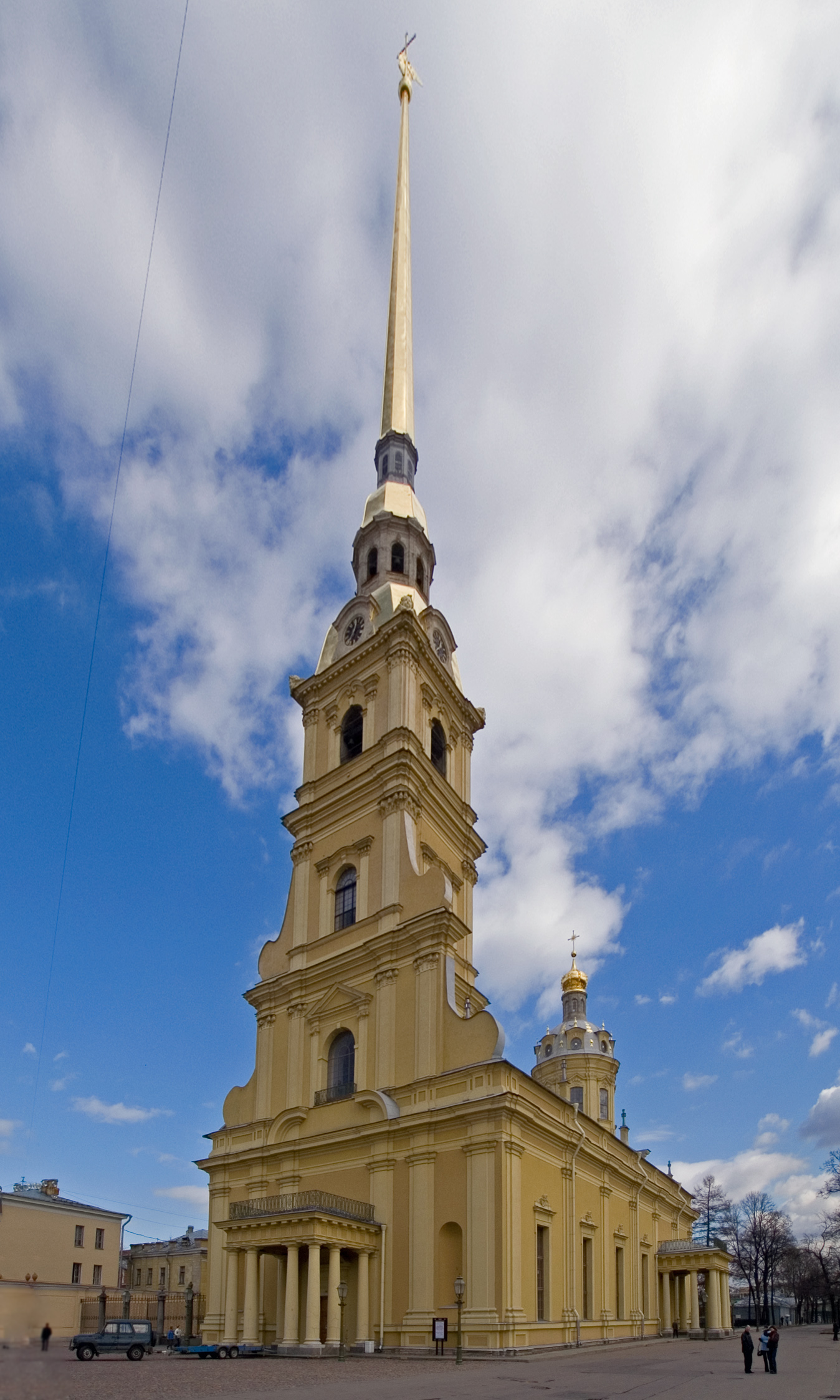 Санкт-Петербург. Петропавловский собор